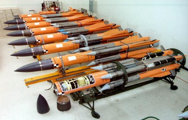 Drones cibles MA-31 de l'US Navy.